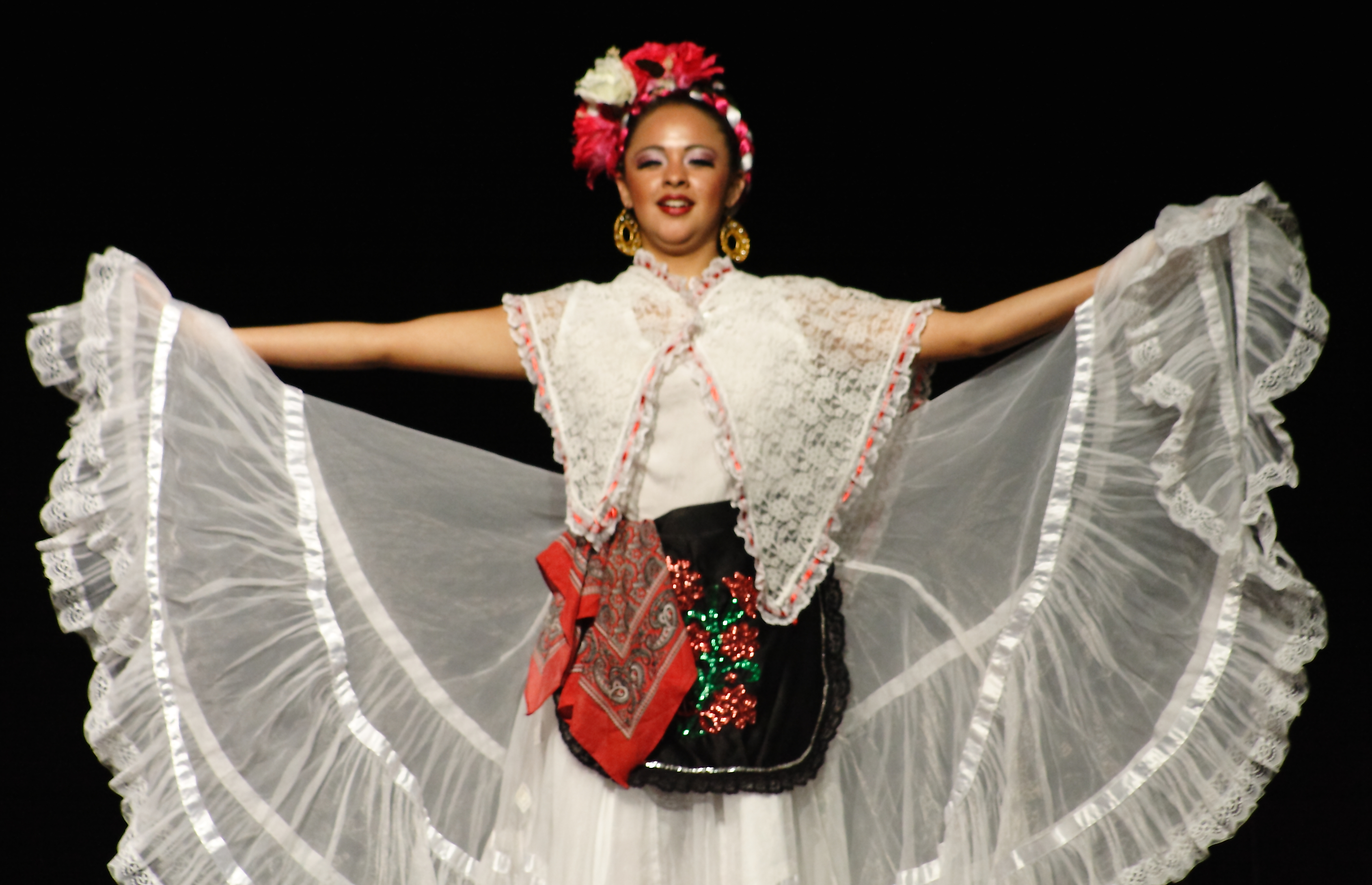 Mujer haciendo baile típico del estado de Veracruz, México. Esto se hizo durante la inauguración de Wikimanía 2015.